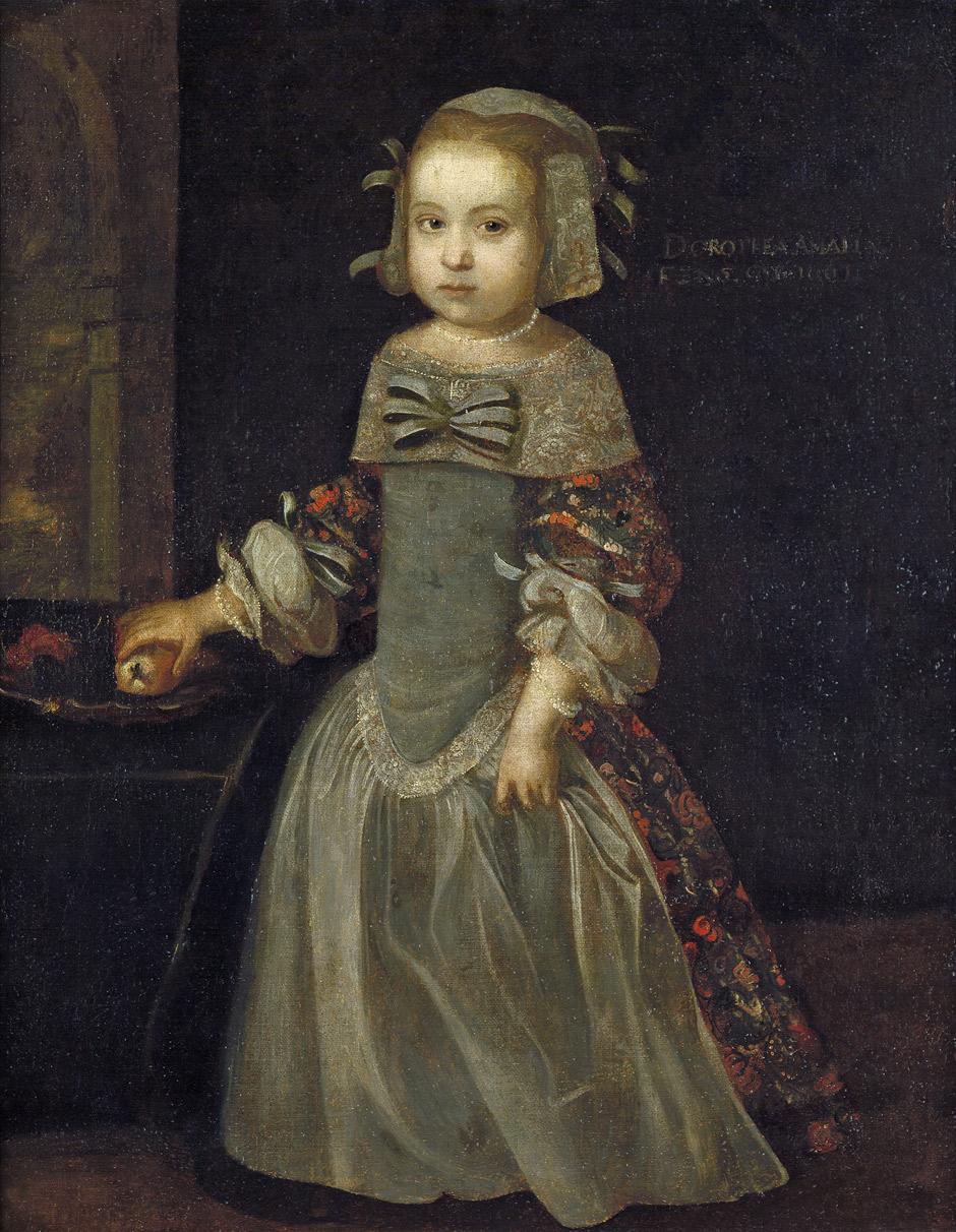 Bildnis der Dorothea Amalie Gräfin von Nassau-Idstein als Kind (Tochter von Johann von Nassau-Idstein). Öl auf Leinwand. 93,5 x 74 cm. Oben rechts betitelt "DOROTHEA AMALIA / FZNS (Fürstin zu Nassau-Saarbrücken) GEB: 1661".